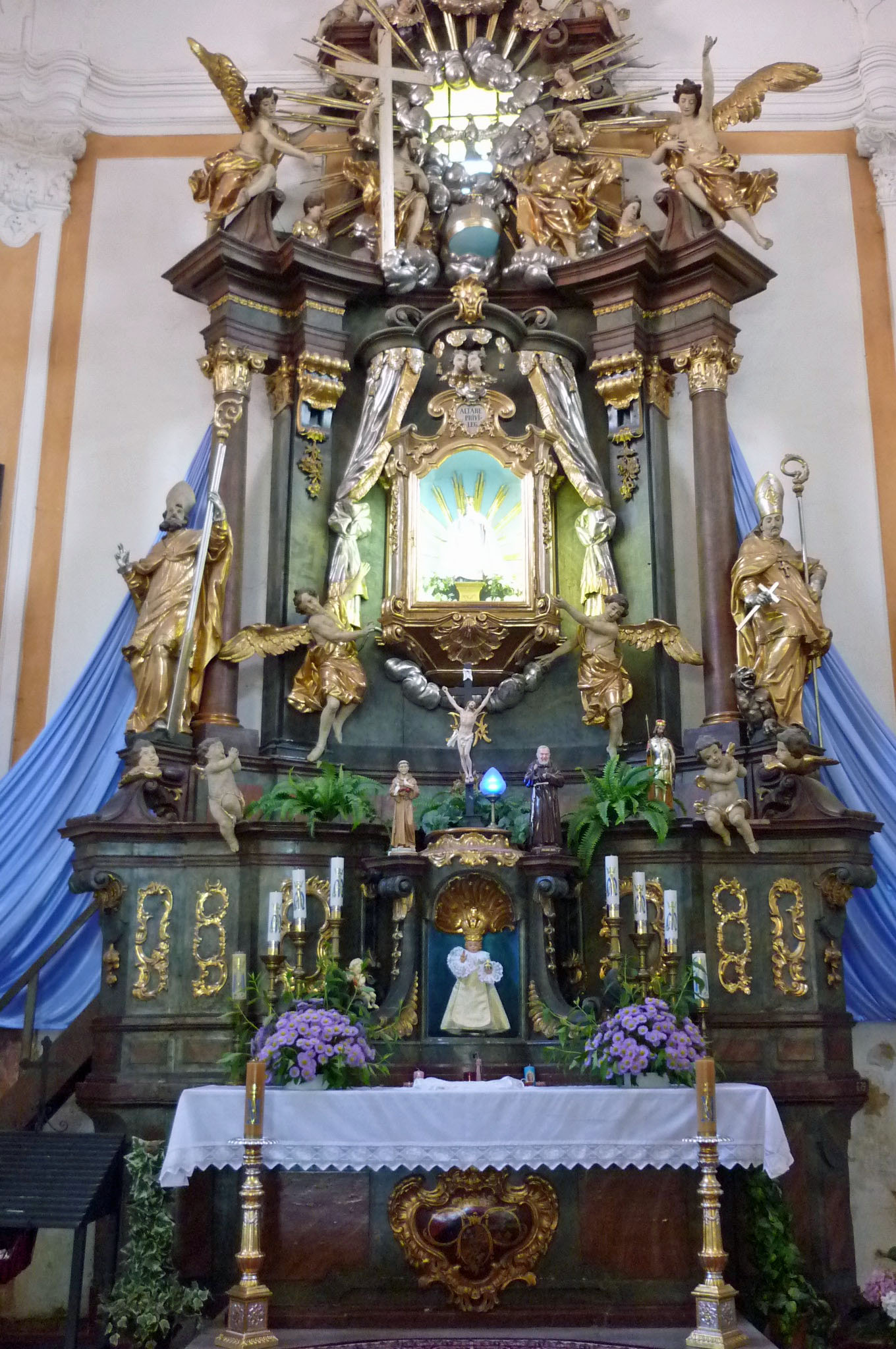 Altar der Wallfahrtskirche in Libeschitz/Liběšice